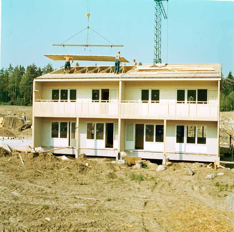 Viksjö, Järfälla kommun. Andebodaområdet. Radhusen utmed Andebodavägen under uppförande 1967, tidigare det stora öppna sädesfältet vid Andeboda.